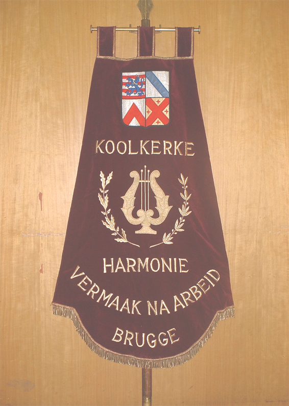 Koninklijke Harmonie "Vermaak na Arbeid", Koolkerke picture of our flag